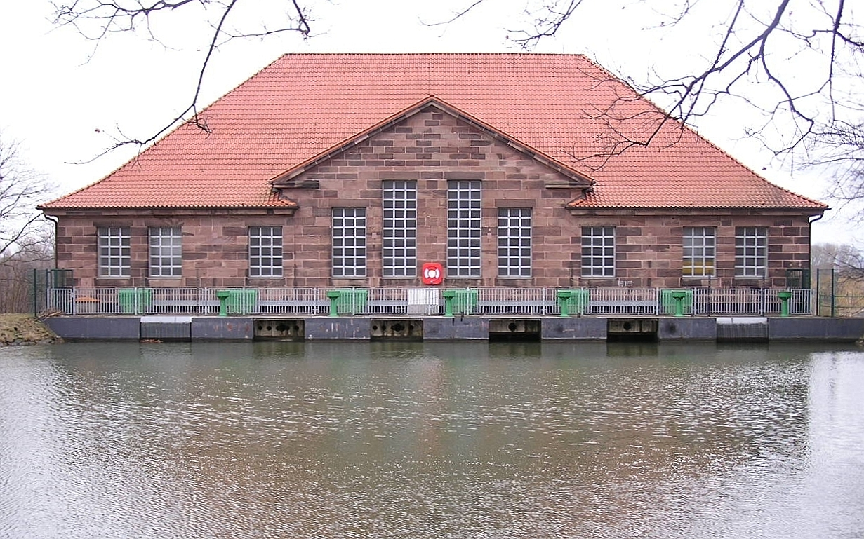 Das Foto zeigt das Hauptpumpwerk am Wasserstraßenkreuz Minden bei Minden, Nordrhein-Westfalen von oben, also vom Niveau des Mittellandkanals aus. Der Bereich des Mittellandkanals von der Schleuse Anderten bis zur Abzweigung aus dem Dortmund-Ems-Kanal wird überwiegend vom Hauptpumpwerk Minden mit Wasser aus der Weser versorgt. Das Hauptpumpwerk wurde 1914 eingeweiht. Es liegt auf der linken Weserseite und südlich des Kanals. Neben der Einspeisung des Weserwassers in den Mittellandkanal wird durch das Ablassen von Überschusswasser in die Weser Strom erzeugt. Die Hälfte des so erzeugten Stromes (insgesamt rund 500.000 kWh) wird für die Gebäude des Wasserstraßenkreuzes genutzt. Von 1995 bis 1999 wurde das Hauptpumpwerk generalüberholt. Jährlich werden etwa 58 Millionen m³ Wasser gepumpt. Die Förderleistung beträgt 16 m³/s.